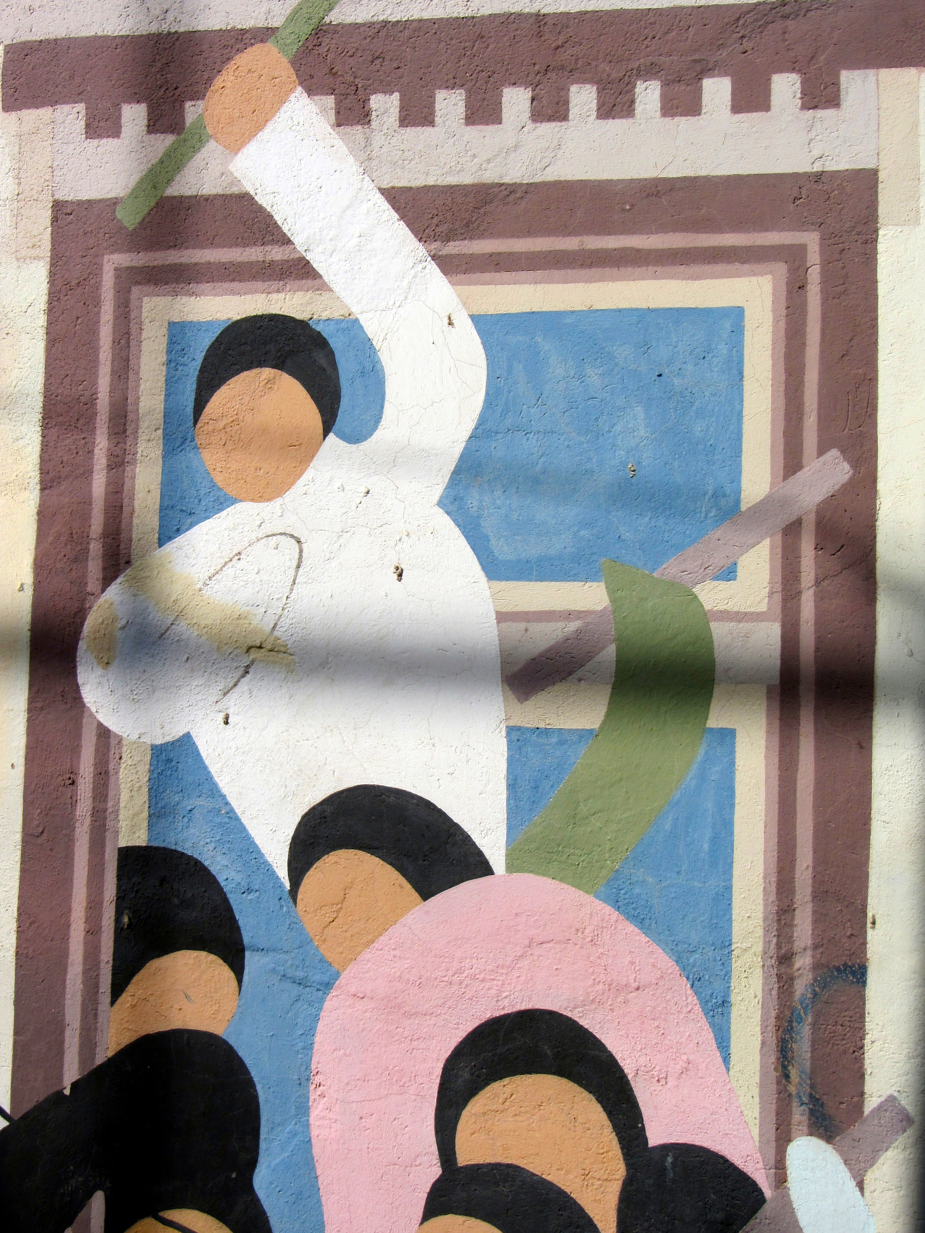 Mural Nº16, Bailarines con volantines (detalle), de Nemesio Antúnez; Museo a Cielo Abrierto, Cerro Bellavista de Valparaíso